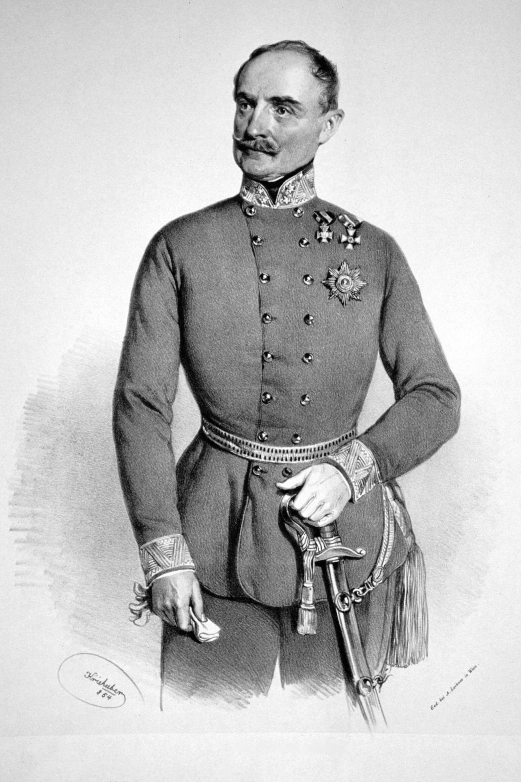 Paul Freiherr von Airoldi (1793-1882), Feldzeugmeister Lithographie von Josef Kriehuber, 1854